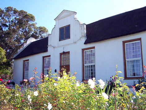 Die plaas Langrietvlei se geskiedkundge opstal tussen Velddrif en Hopefield. This media shows a South African Protected Site with SAHRA file reference 9/2/042/0012-001.